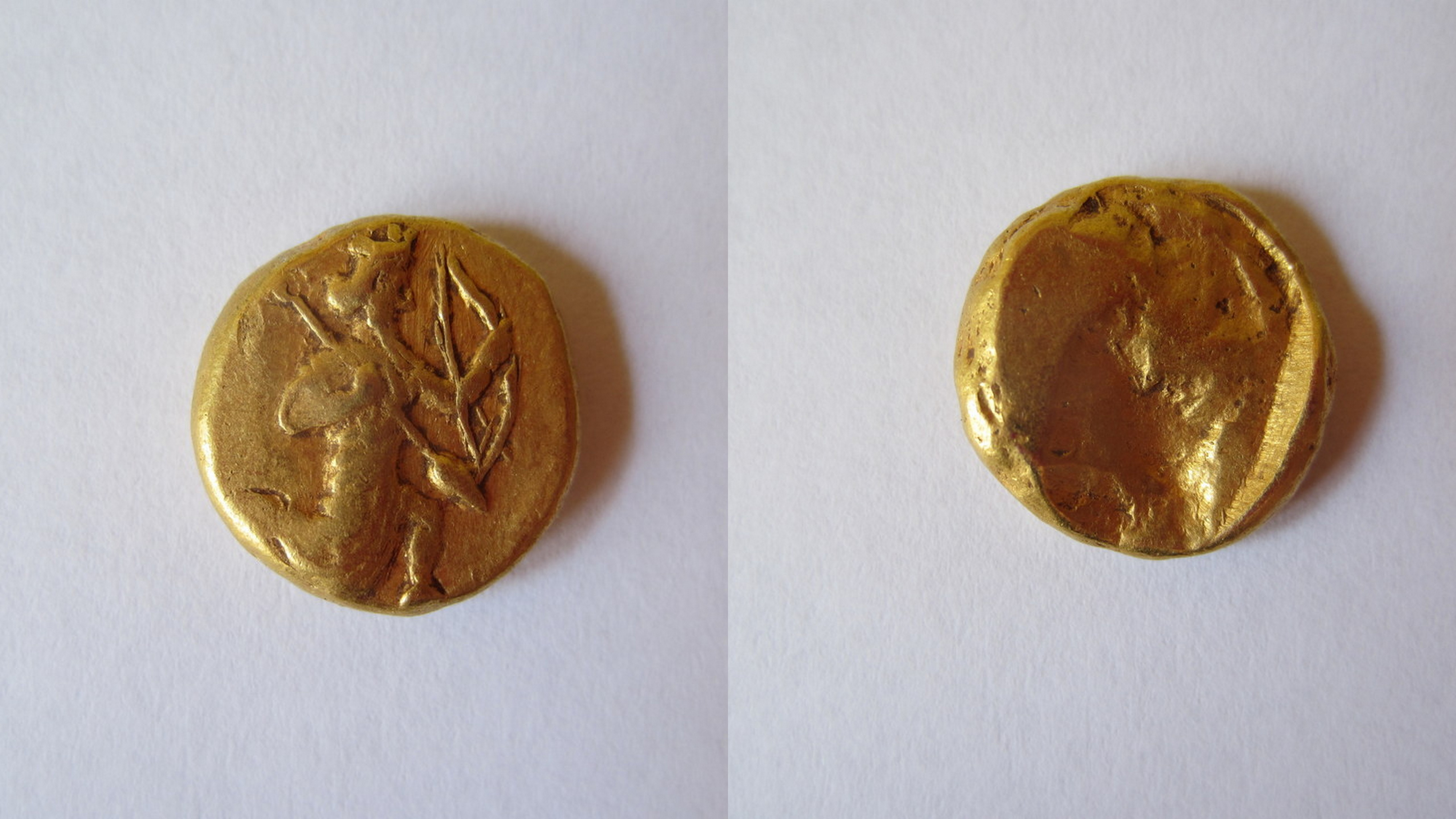 Royaume de Perse. Darius III Codoman (336 - 330 av JC). Darique d'or (8,36 grammes). Avers : Le roi agenouillé tenant un arc et une lance. Revers : carré creux.